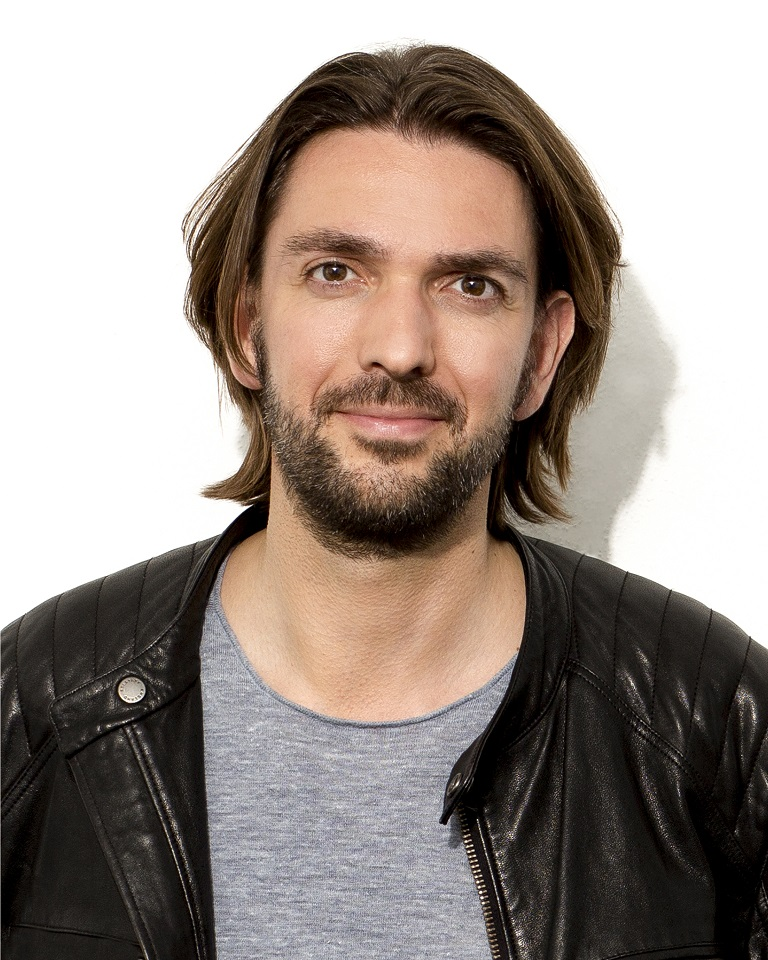 Porträt Max Wiedemann 2018